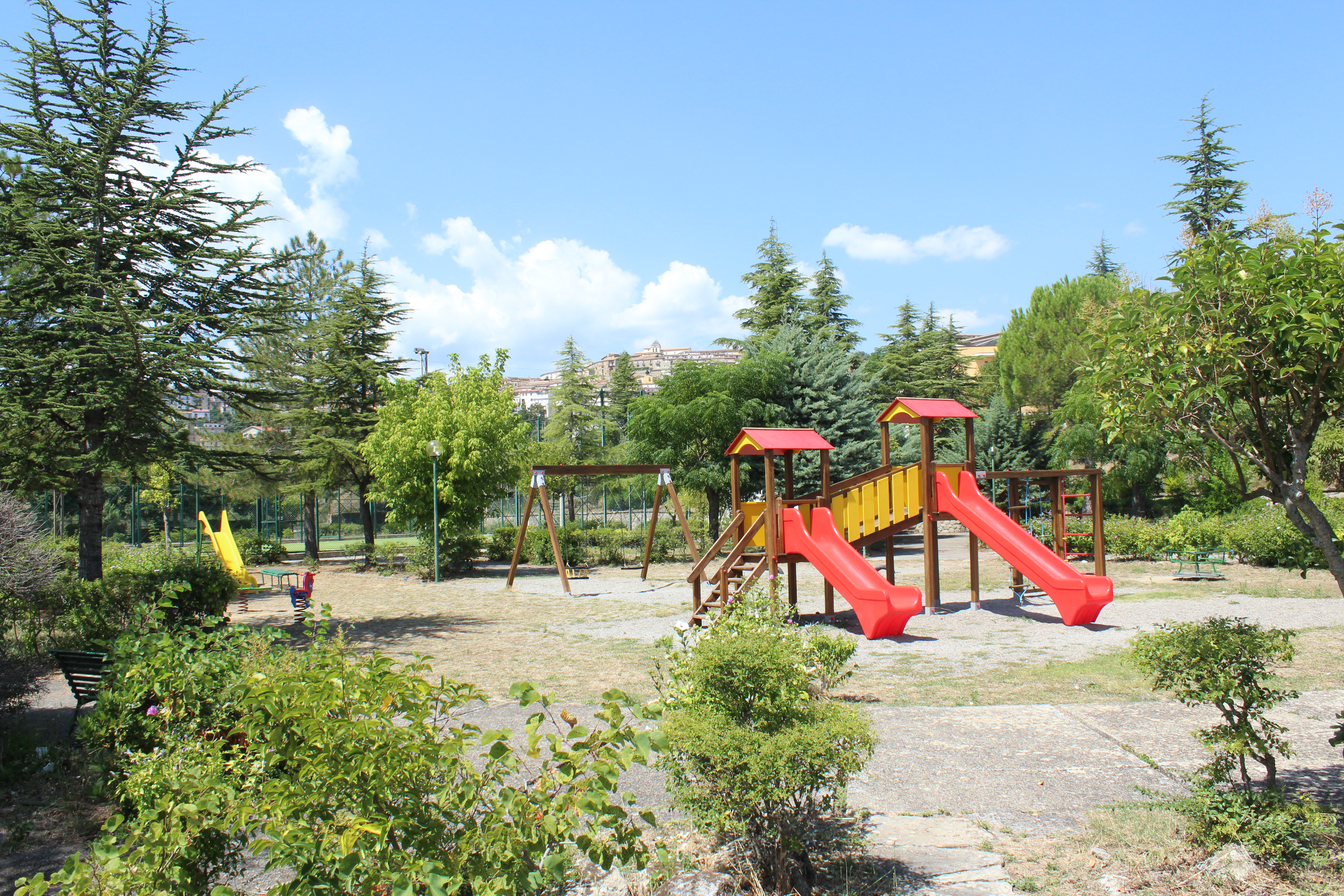 Giardini comunali (Albidona)